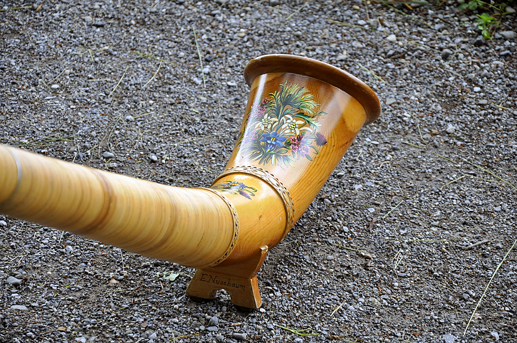 Detail eines Alphorn mit folkloristischer Bemalung